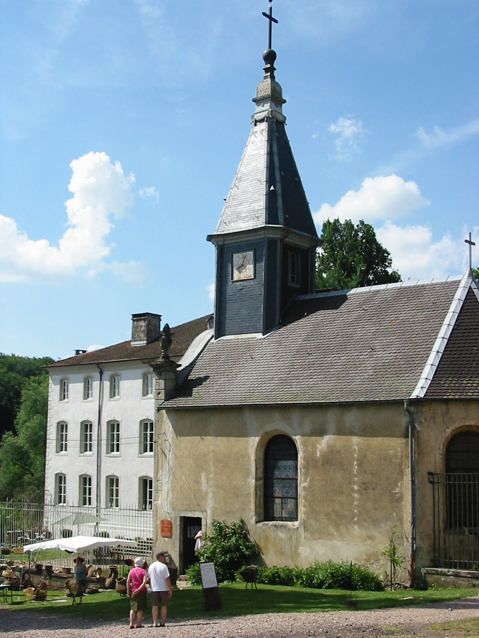 Manufacture Royale de Bains-les-Bains, dans les Vosges : la chapelle.